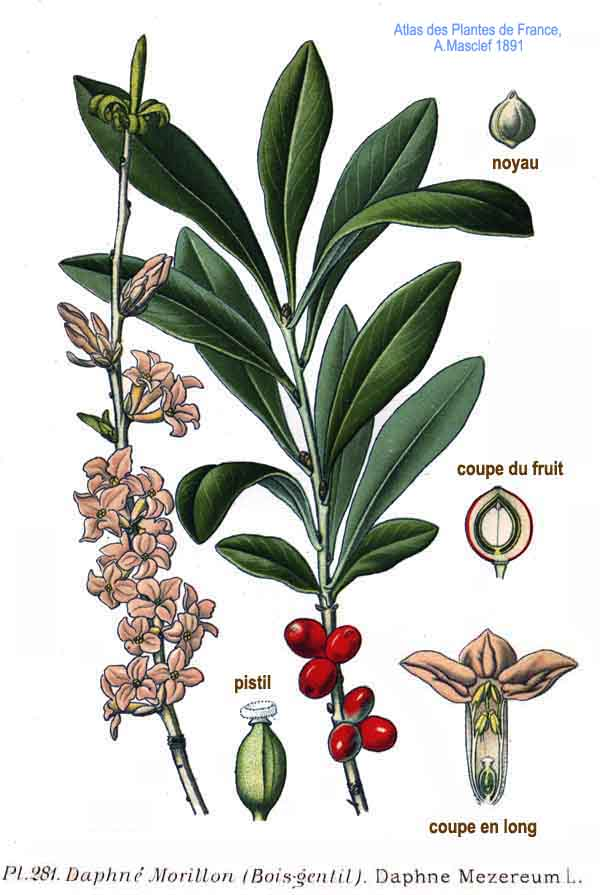 Daphne mezereum L.